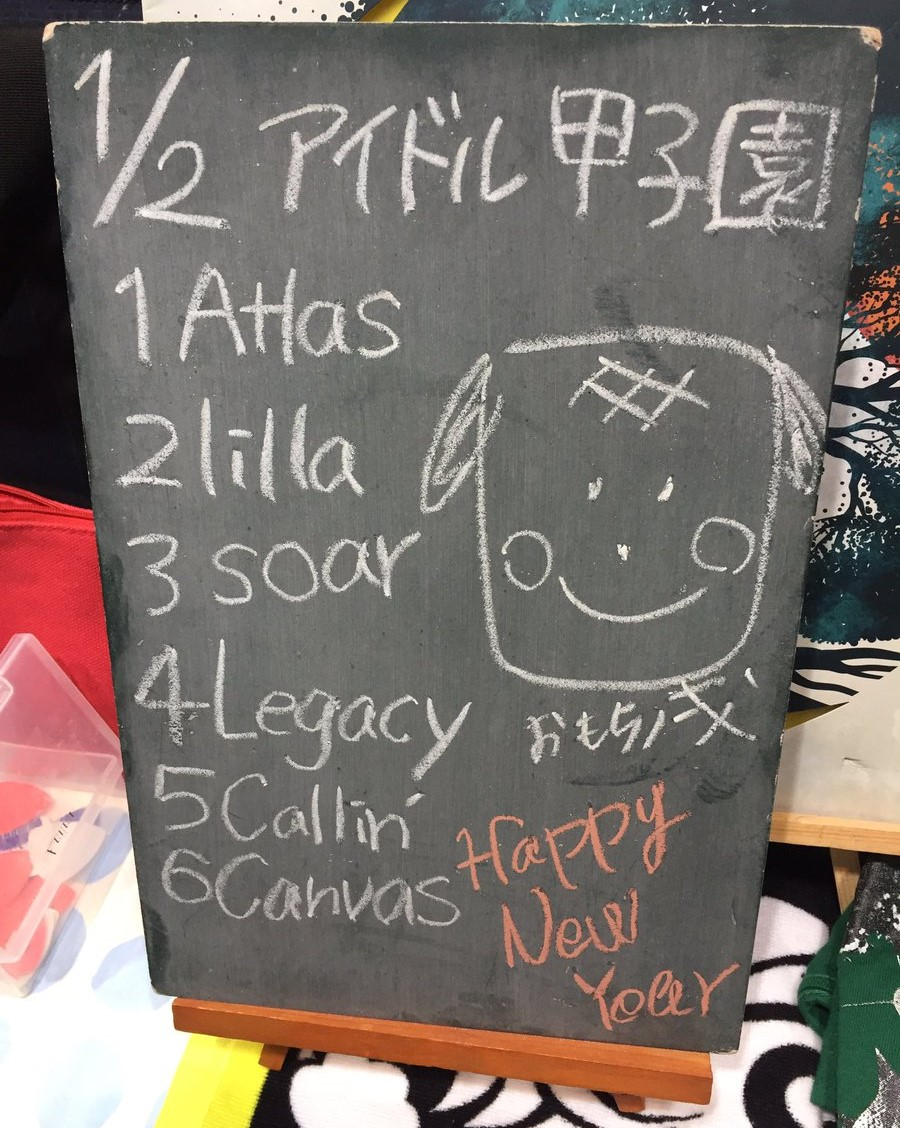 amiinAセトリボード(20180102(1))